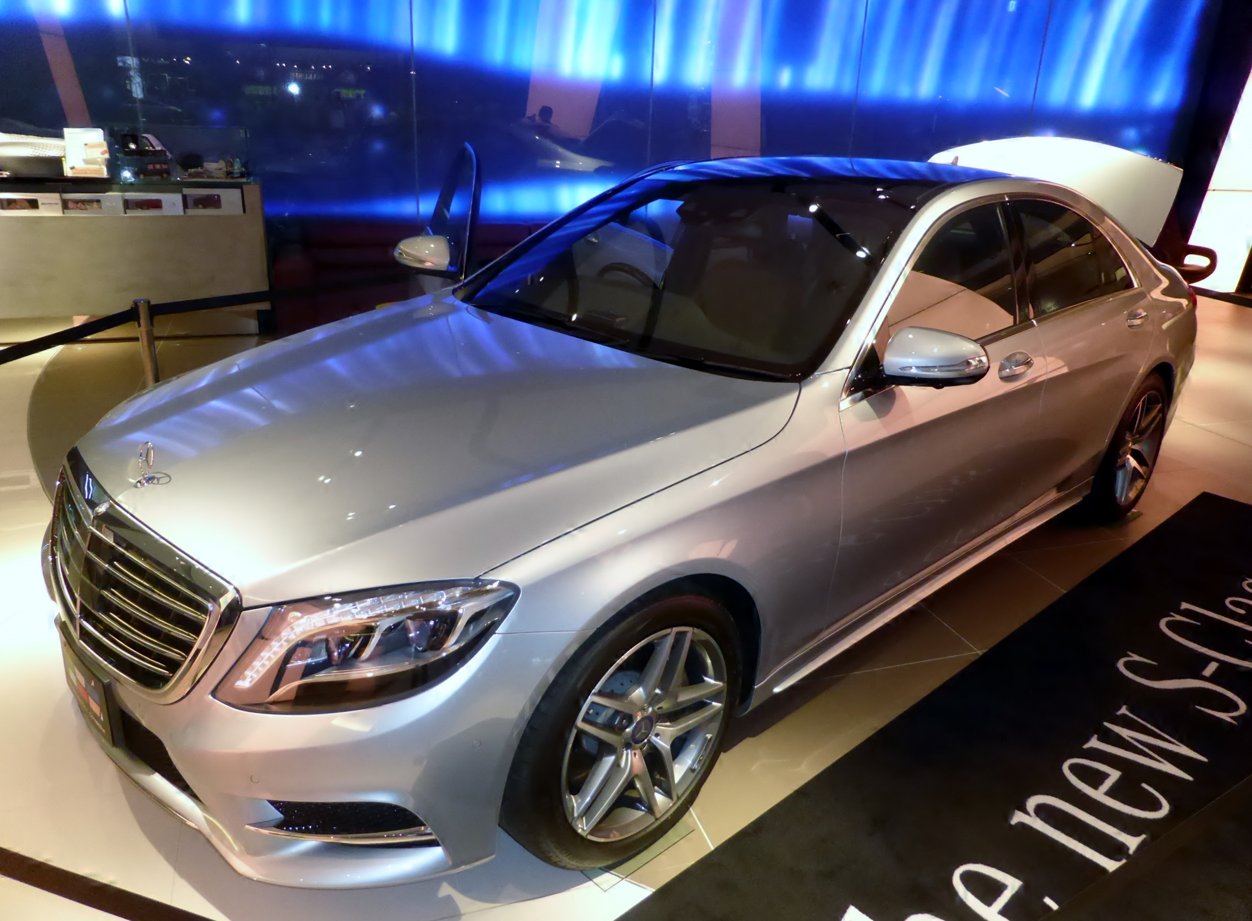 W222型メルセデス・ベンツS400ハイブリッドをフロントから撮影。